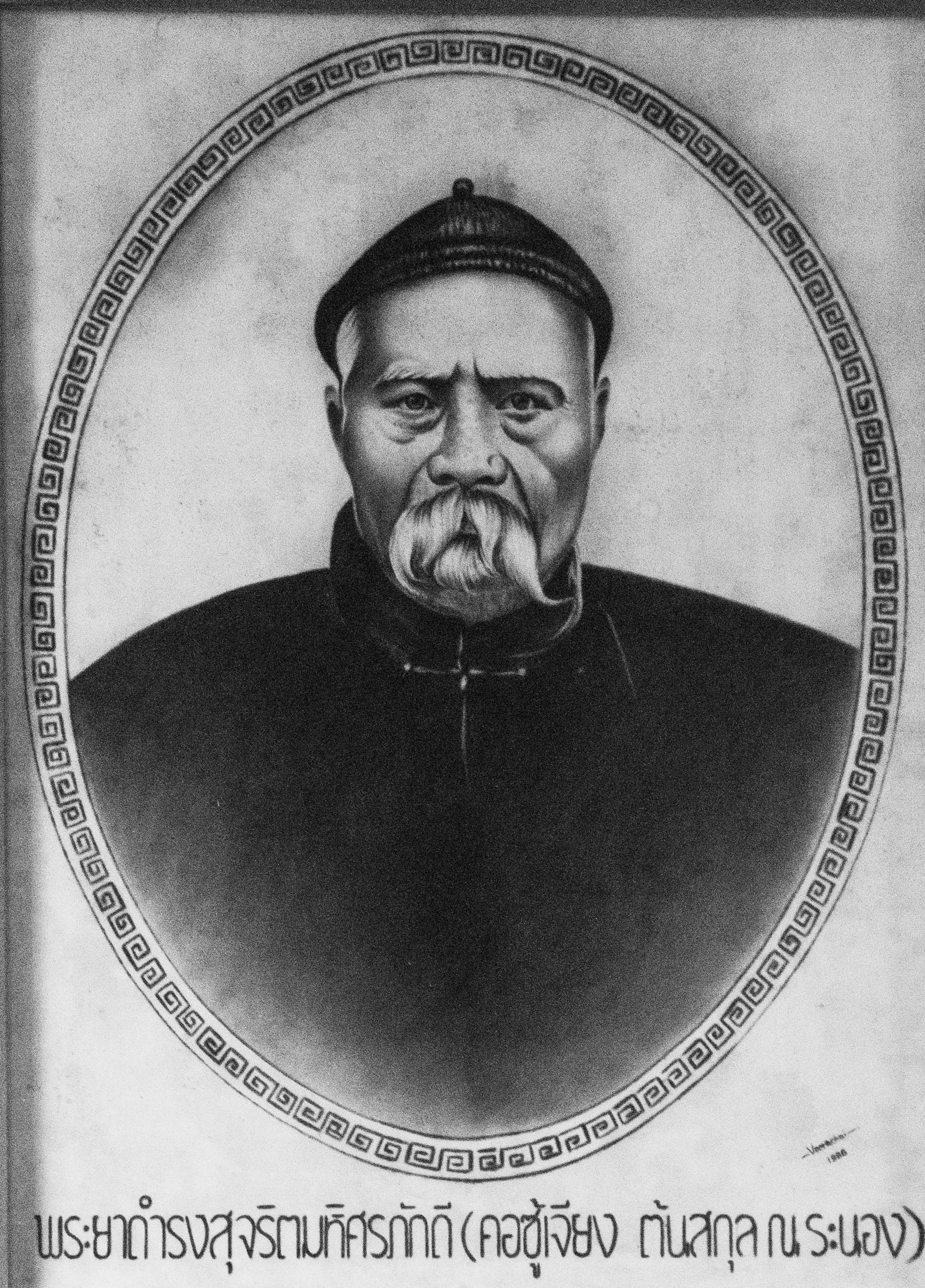 ภาพวาดพระยาดำรงสุจริตมหิศรภักดี (ถ่ายจากจวนเจ้าเมืองระนอง)